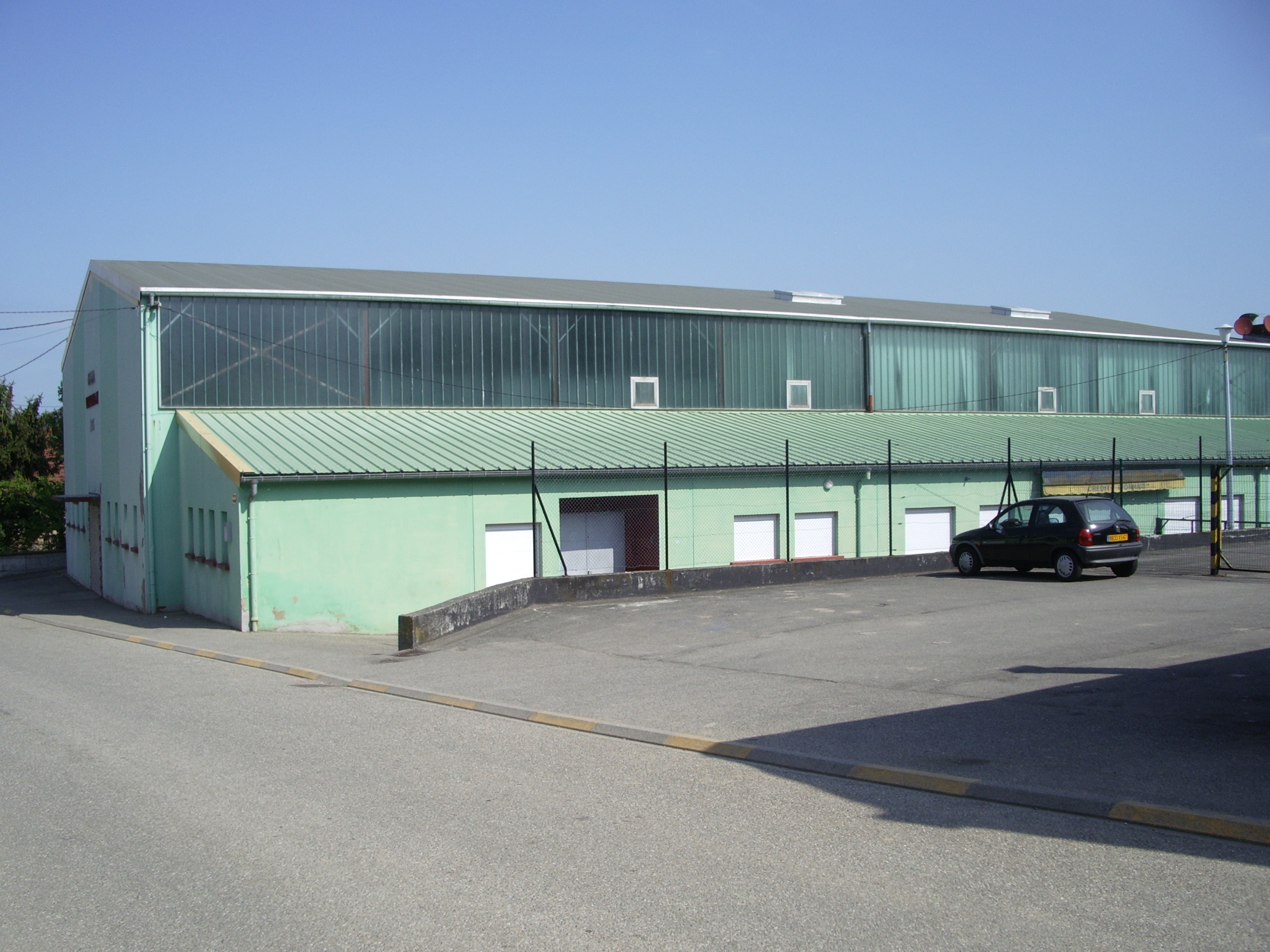 Vue du hall de sport Gallia à Weitbruch, rue de l'Église. Le bâtiment sert principalement comme salle de basketball.